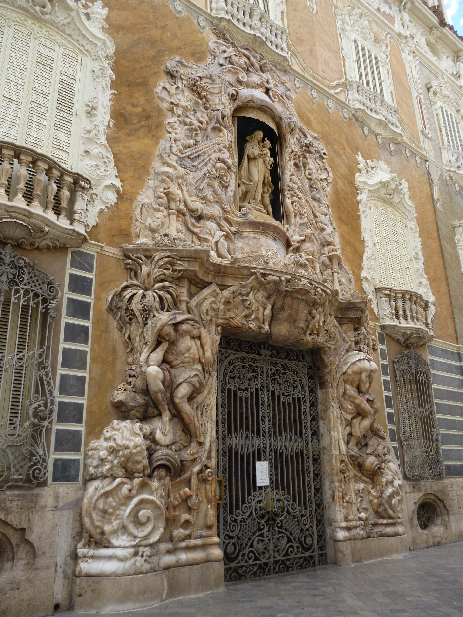 Façana del Palau del Marqués de Dosaigües